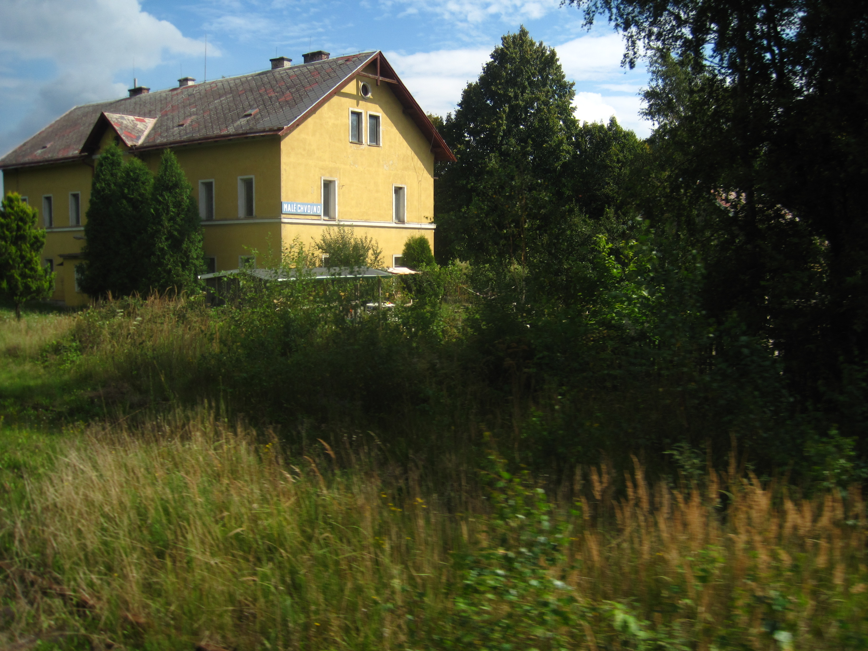 Malé Chvojno - nádraží (z okna Kozí dráhy)